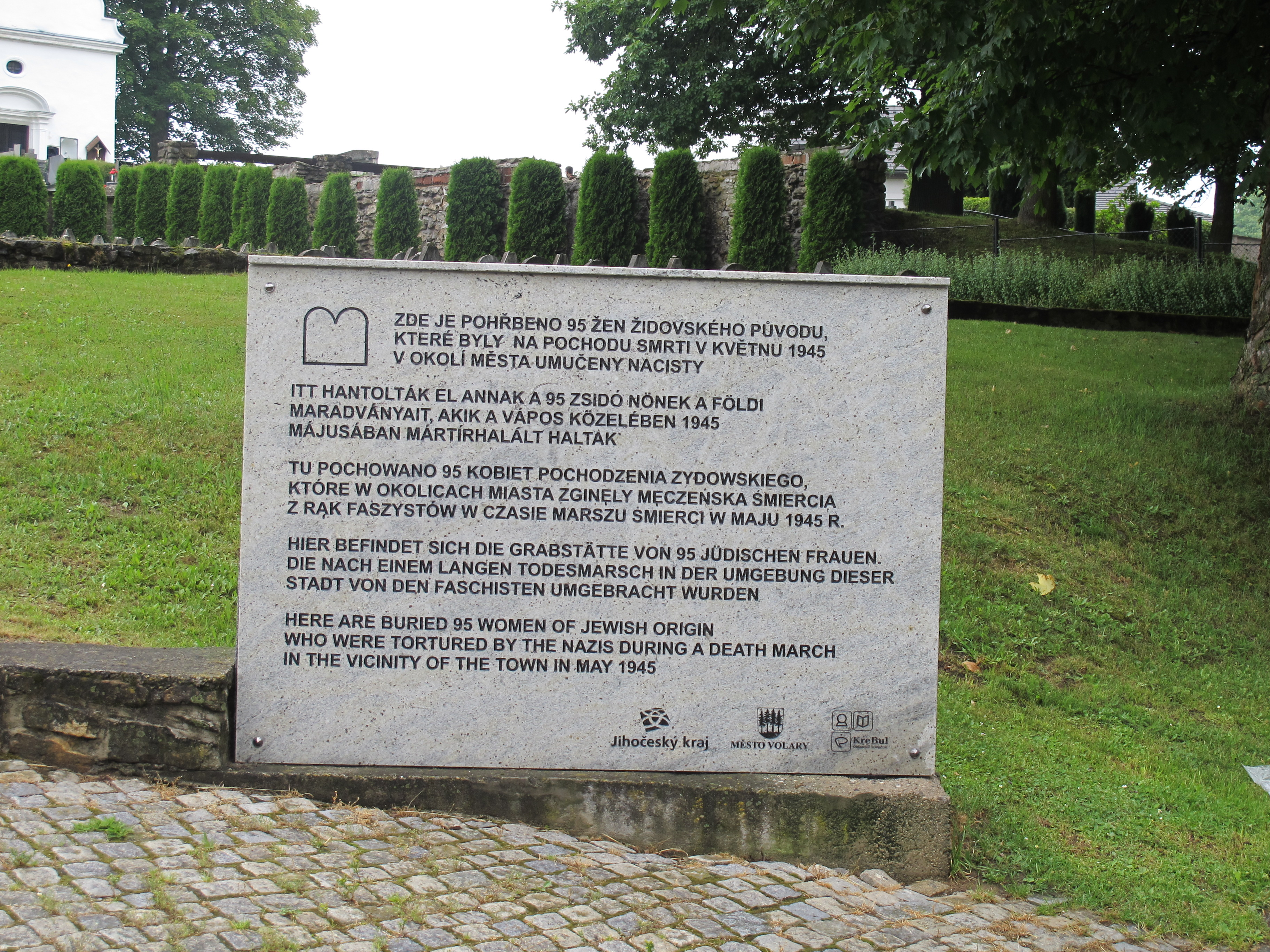 Hřbitov válečný (Volary), Zlatá stezka, Volary.